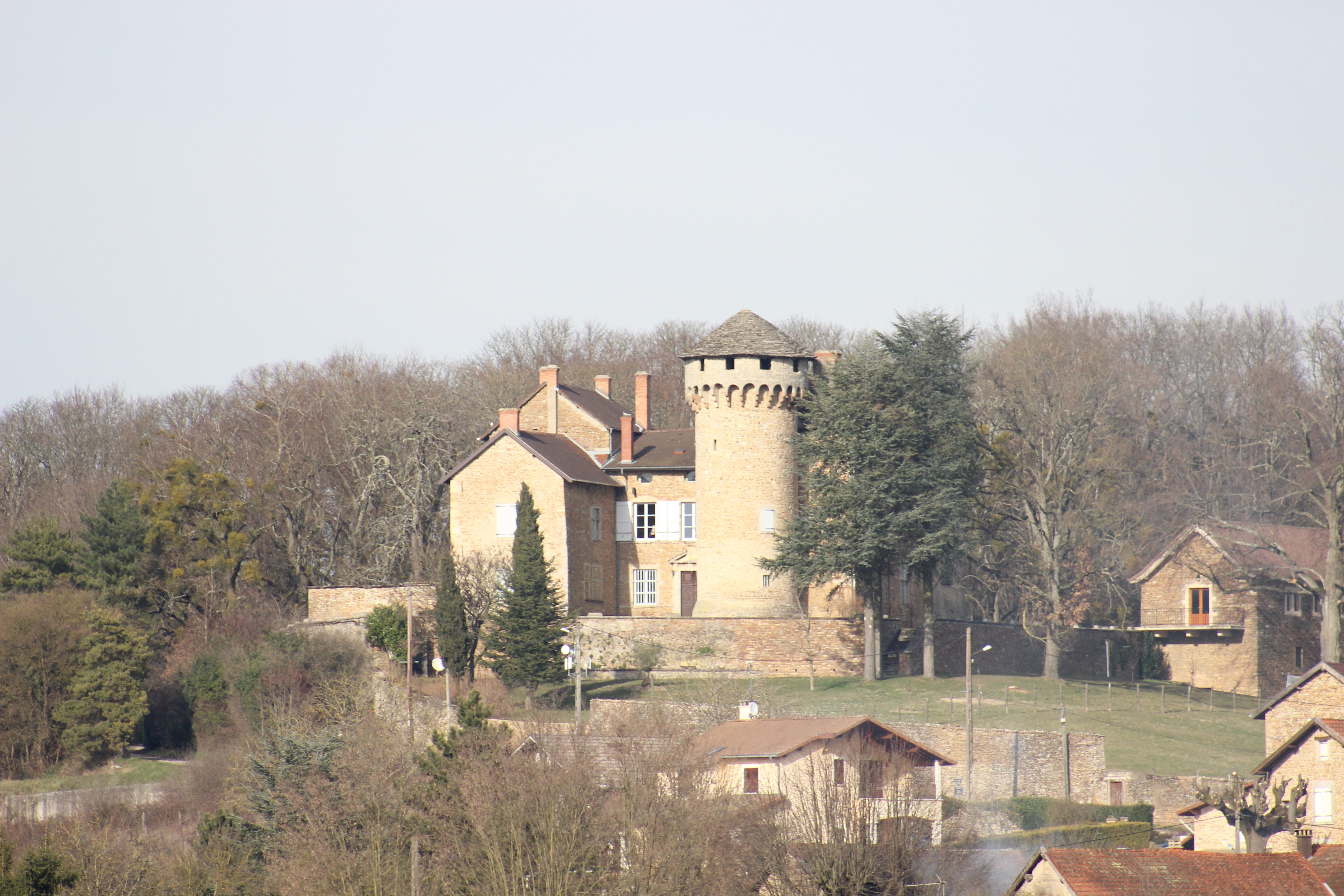 Le château de Poizieu à Chozeau. Il est inscrit au titre des monuments historiques depuis 1979.